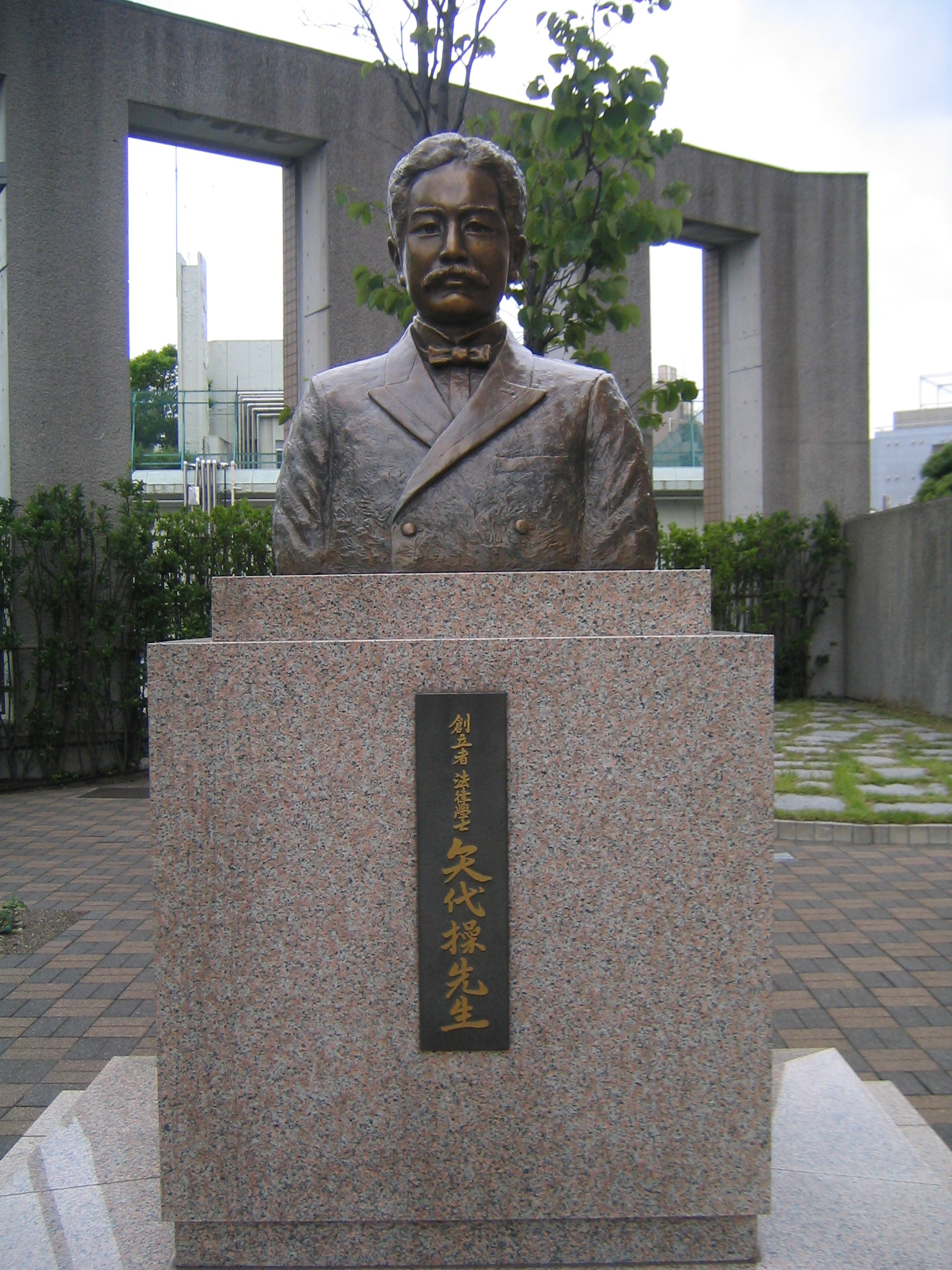 明治大学駿河台キャンパスに立つ矢代操胸像